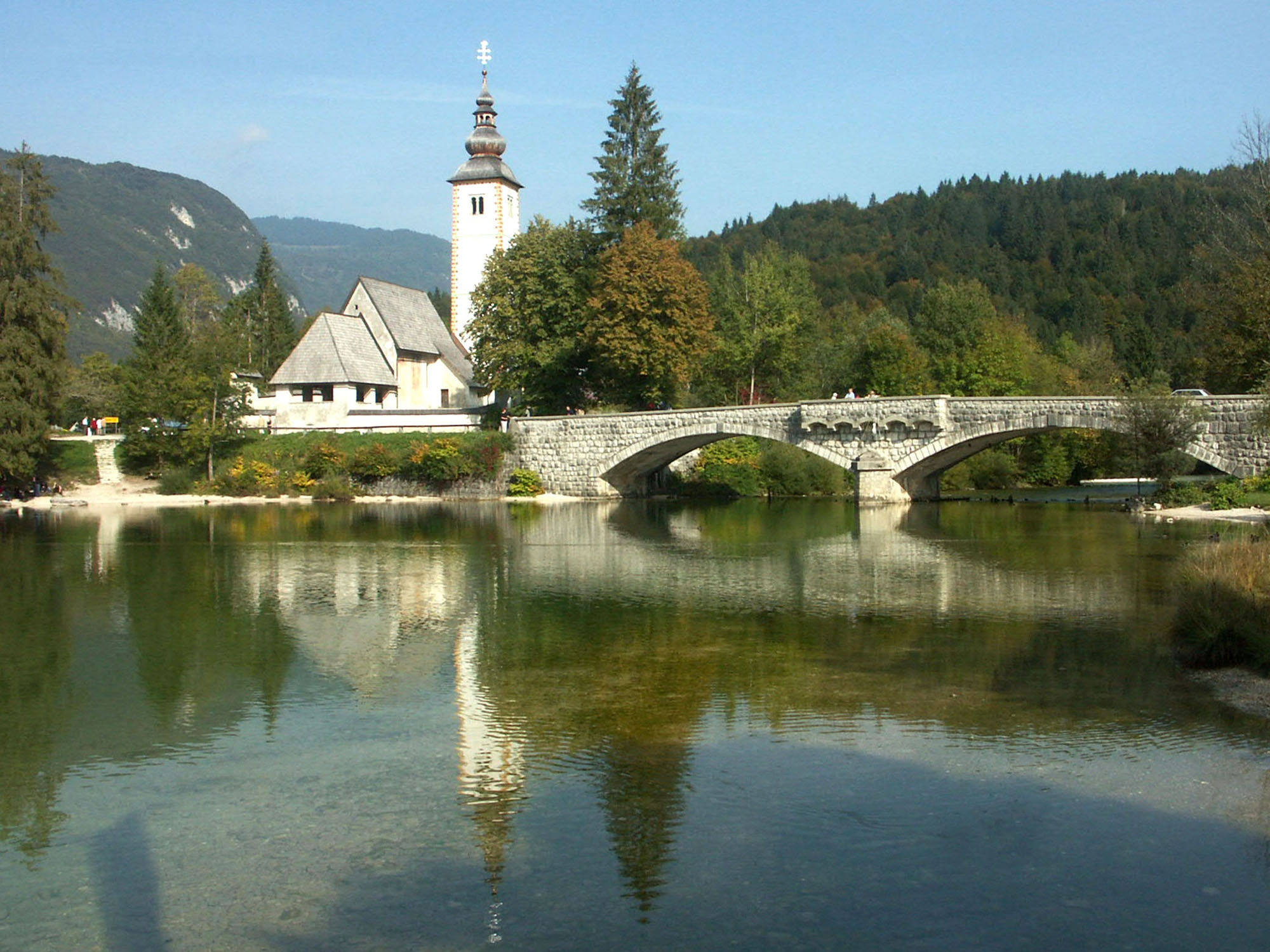 Ostende des Wocheiner Sees mit der Kirche sv. Janez (Ribčev Laz)